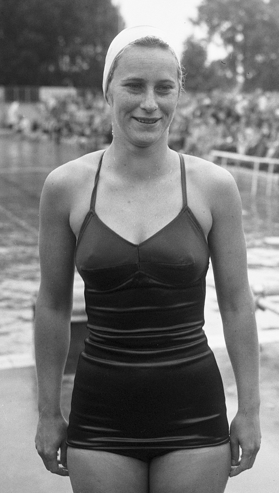 Els van den Horn